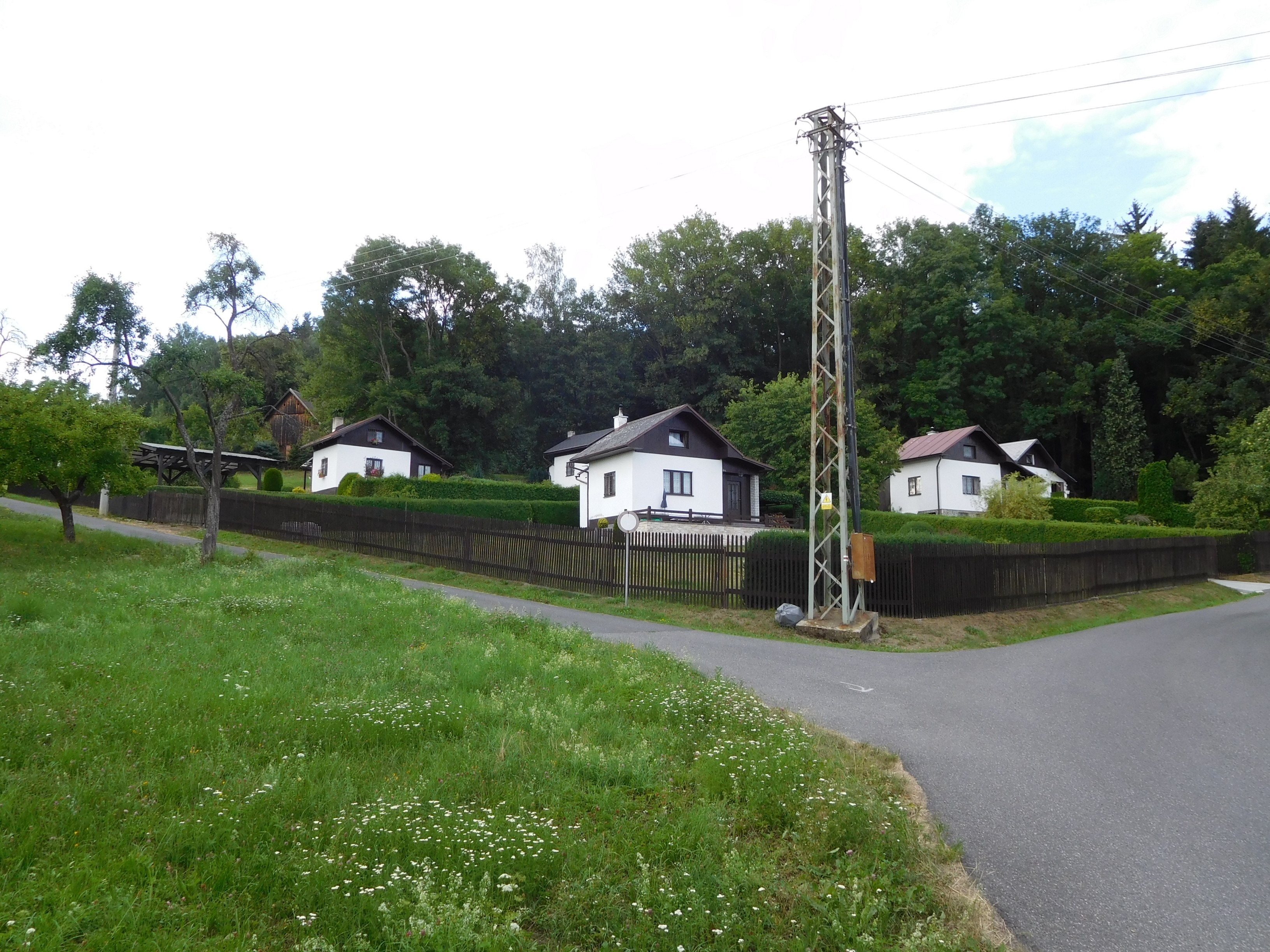 Borek - chatová osada